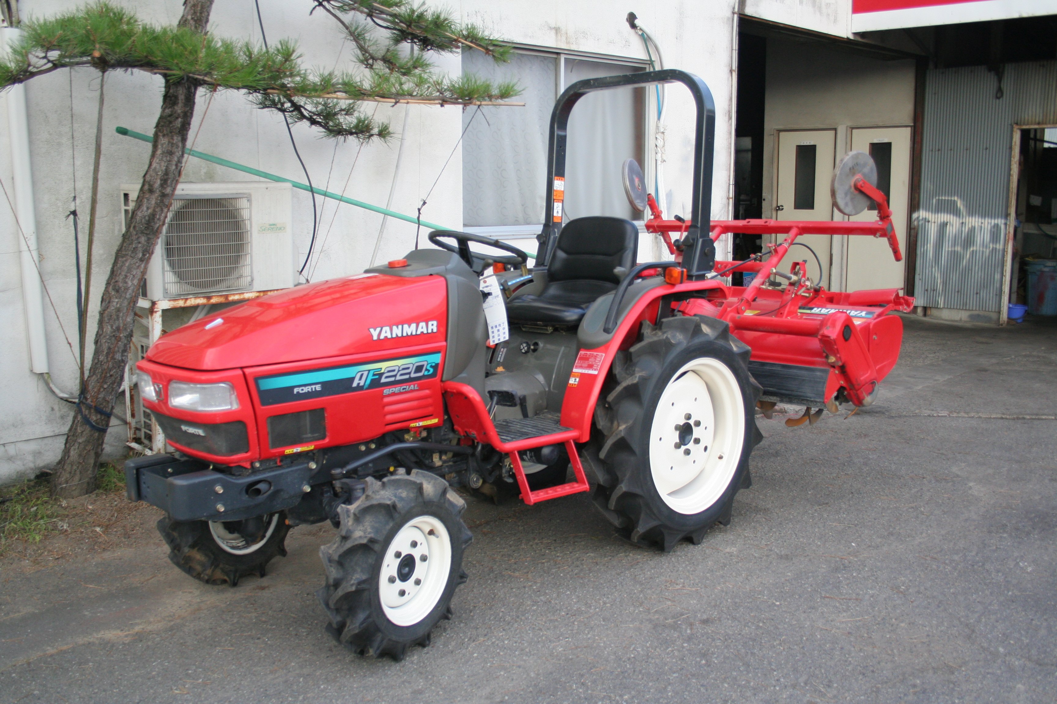 日本の農作業用機械。ヤンマーの農作業用トラクター。